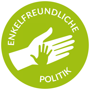 Slogan zur Stadtratswahl in Augsburg 2020